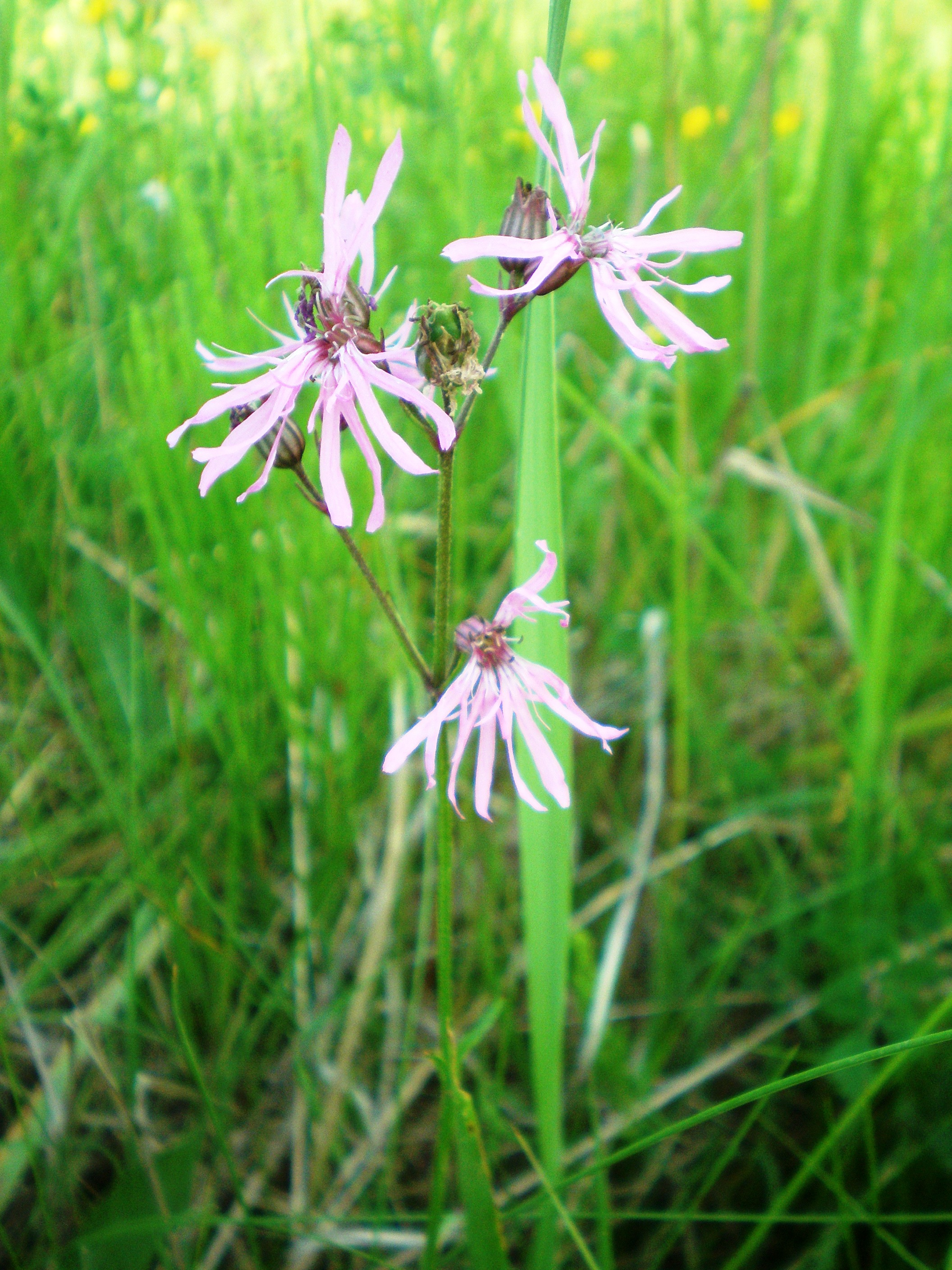 Lychnis flos-cuculi